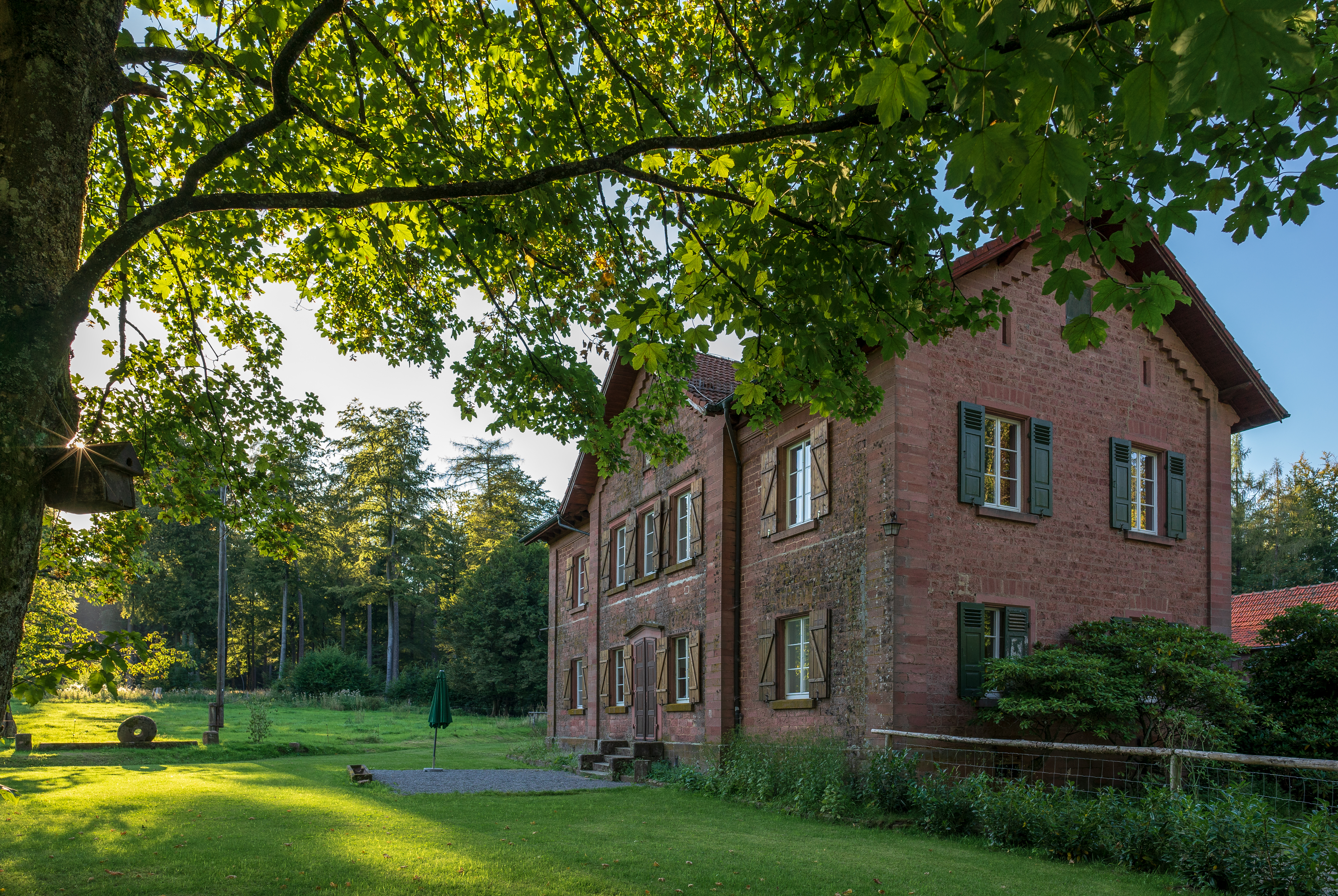 Das um 1850 erbaute Herrenhaus des ehemaligen Jagdschloss Max-Wilhelmshöhe auf dem Winterhauch, einer bewaldeten Anhöhe beim Katzenbuckel auf dem Gebiet der Gemeinde Waldbrunn im Odenwald. Hint: The sunstars (aka diffraction spikes) in this image have not been added in post-production or by using effect filters etc., but are a speciality of the Loxia lens used for this photograph, which (for the good or the bad) creates well-defined sunstars beginning at f/4. I cannot avoid that, so let us enjoy it. ;–)